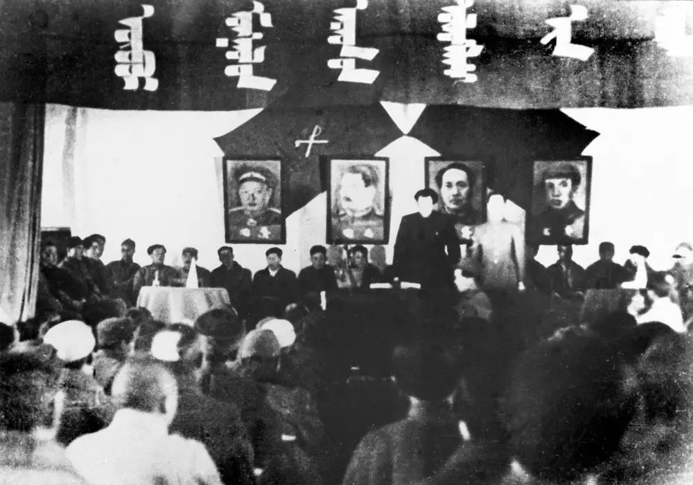 原图注：内蒙古人民代表会议的主席台（1947年4月23日摄） 新华社发